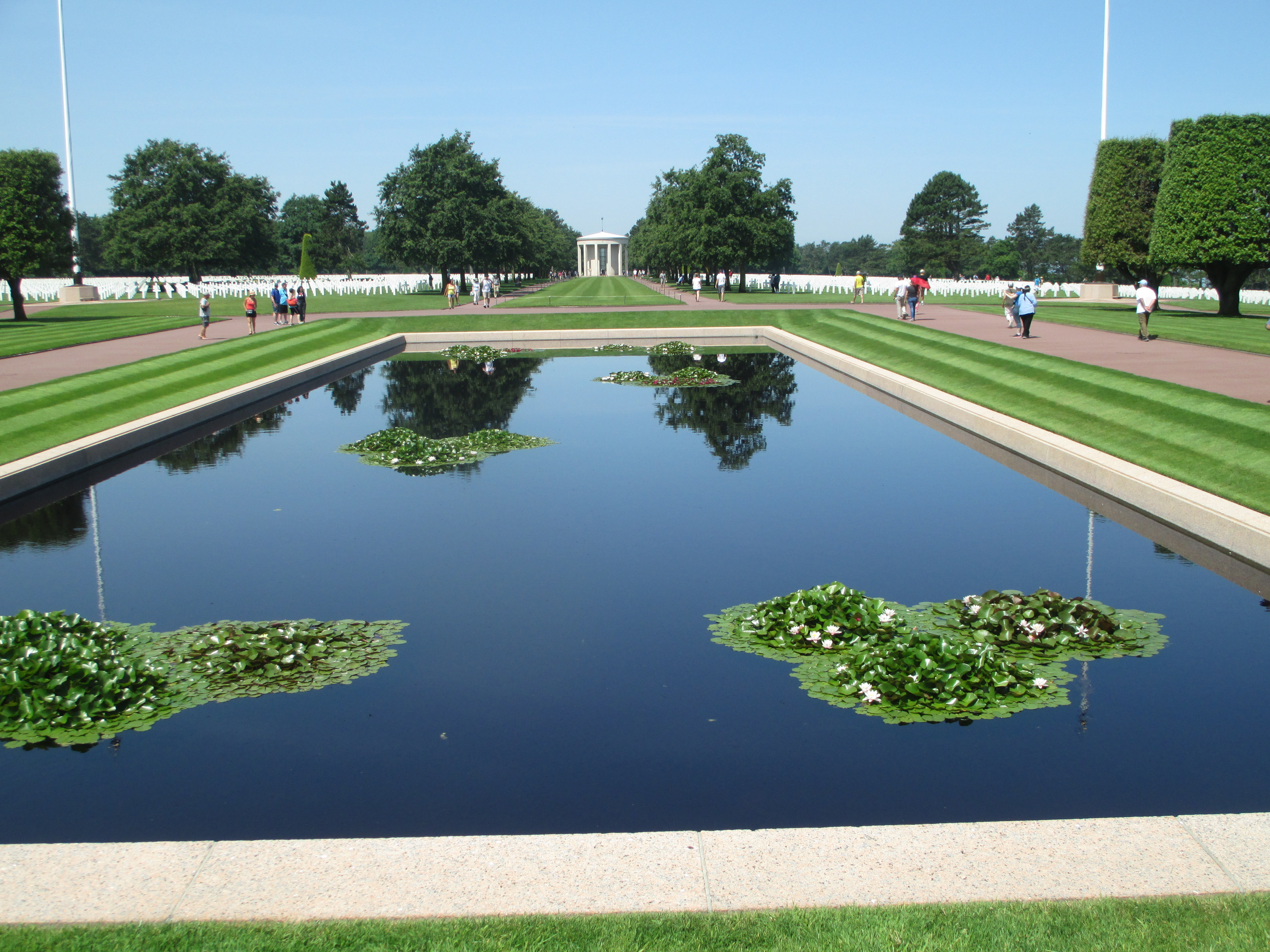 בית הקברות הצבאי האמריקאי בנורמנדי